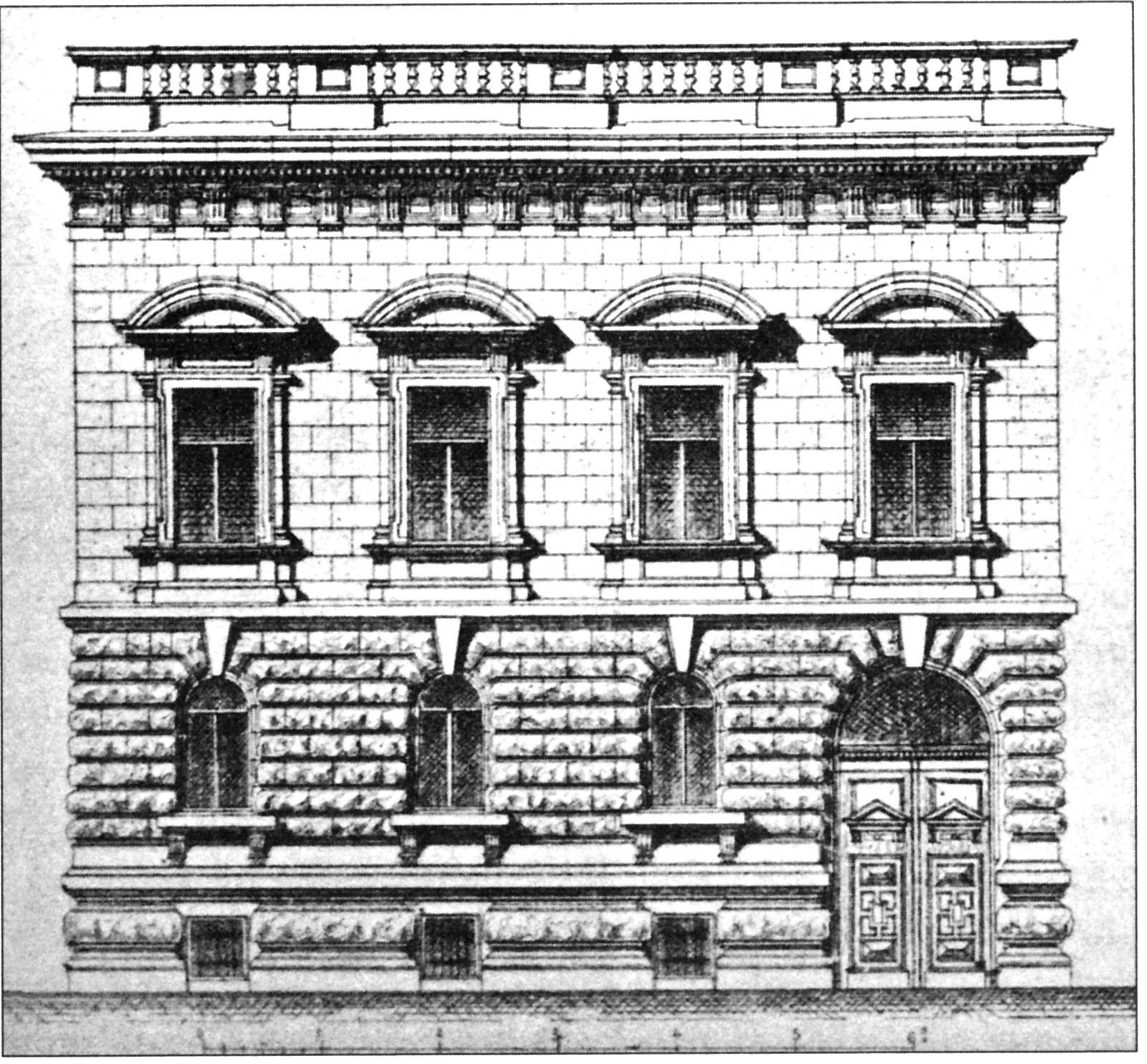 A Kincsem palota vagy Blaskovich-palota rajza a budapesti Reáltanoda utcában, neoreneszánsz, 1878.